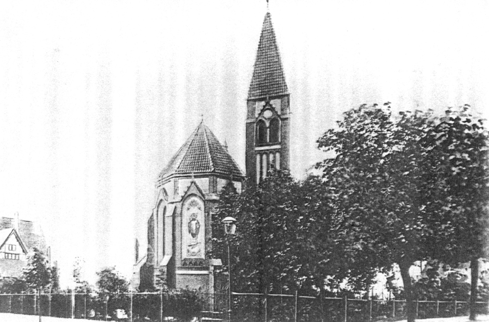 katholische Adalbertkapelle in Königsberg-Amalienau, Ostpreußen, Blick auf die Ostseite